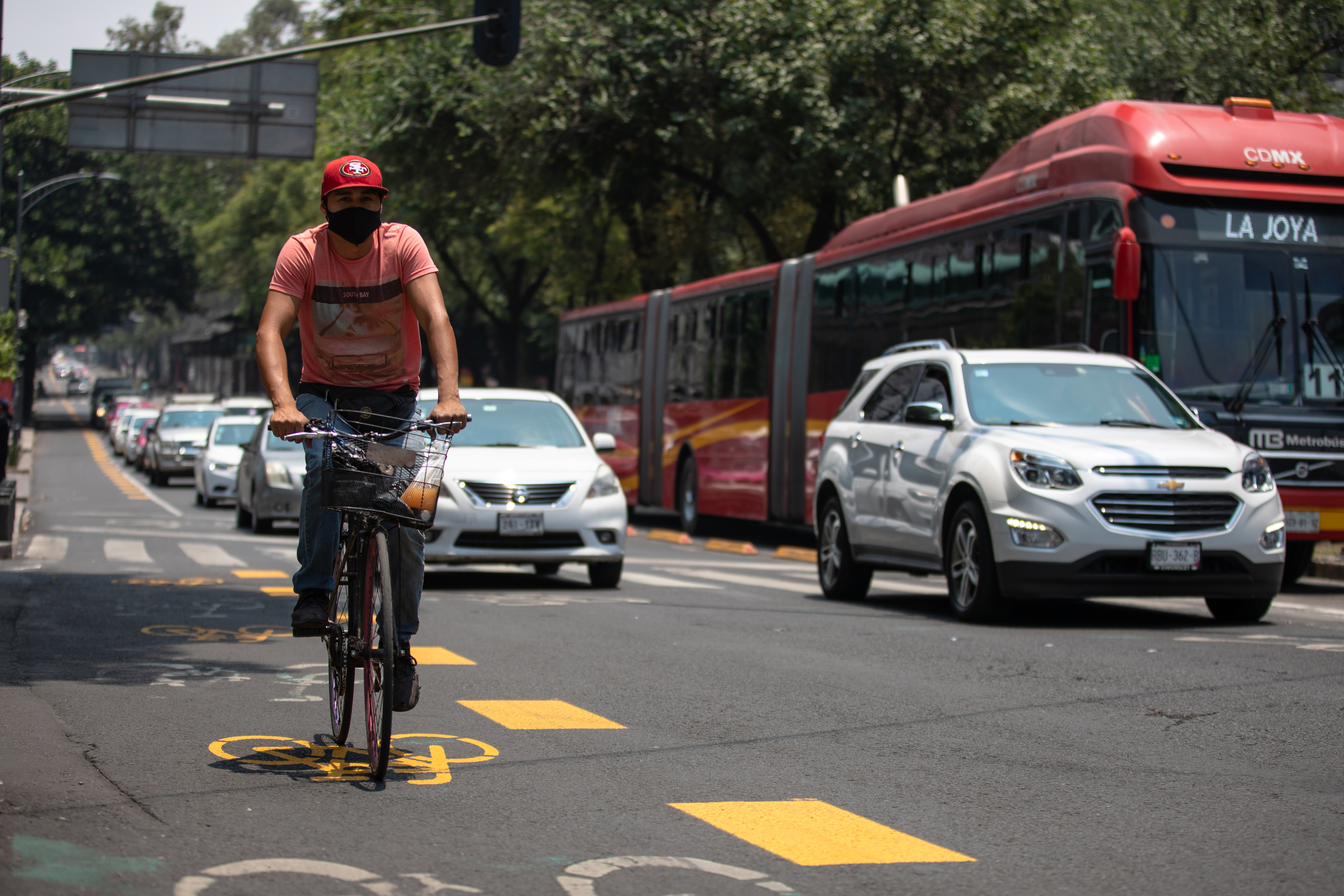 Eventualmente la Ciudad de México va a regresar a la "Nueva Normalidad". En ese momento, será esencial mantener lo más despejado posible el transporte público para permitir la "sana distancia". Como parte de las acciones que el gobierno de la ciudad está llevando a cabo, se habilitó uno de los carriles de la Avenida Insurgentes (una de las más largas del mundo) como una ciclovía emergente. Se pretende, con esta medida poco ortodoxa, impulsar el uso de la bicicleta.